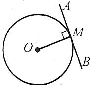 это рисунок касательной к кругу